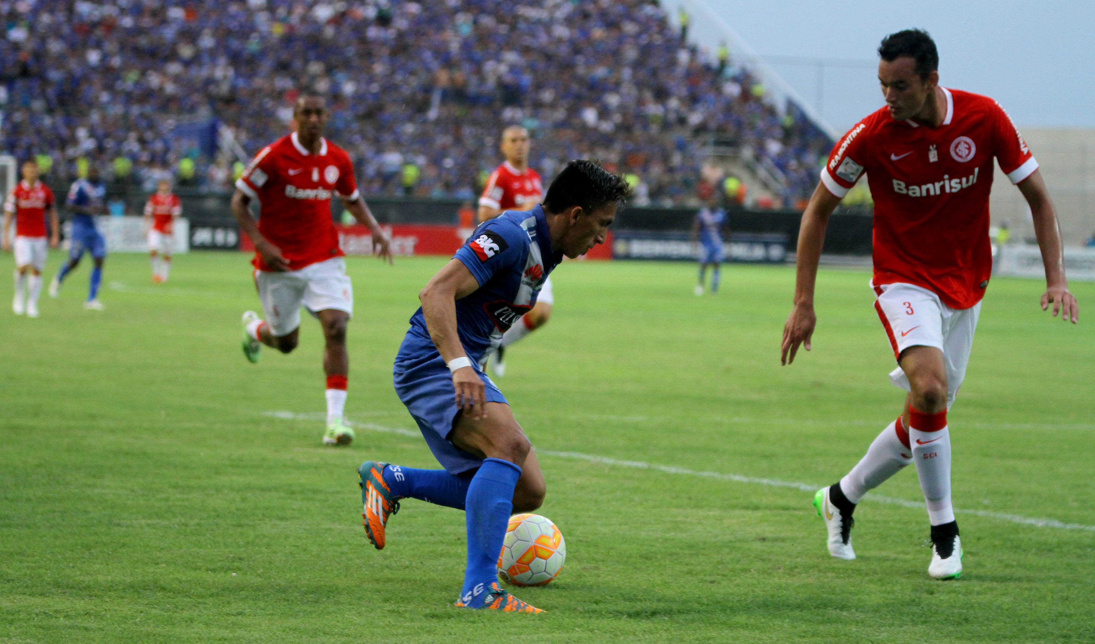 Guayaquil, Miércoles 18 de marzo del 2015 (ANDES).-Emelec se enfrenta a Internacional de Brasil por la Copa Libertadores Foto:César Muñoz/ANDES